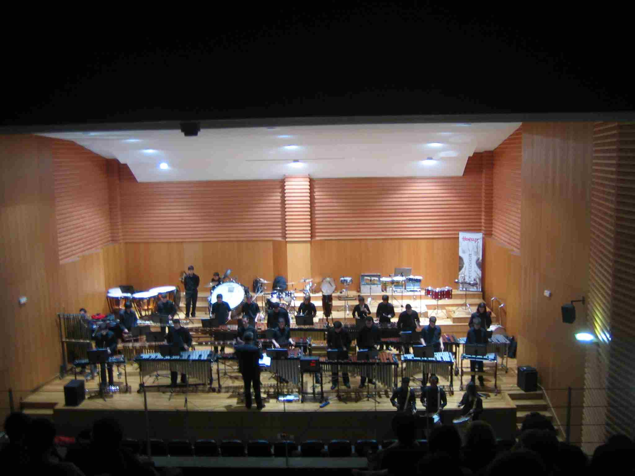 Concierto de percusión en la Sala Roca